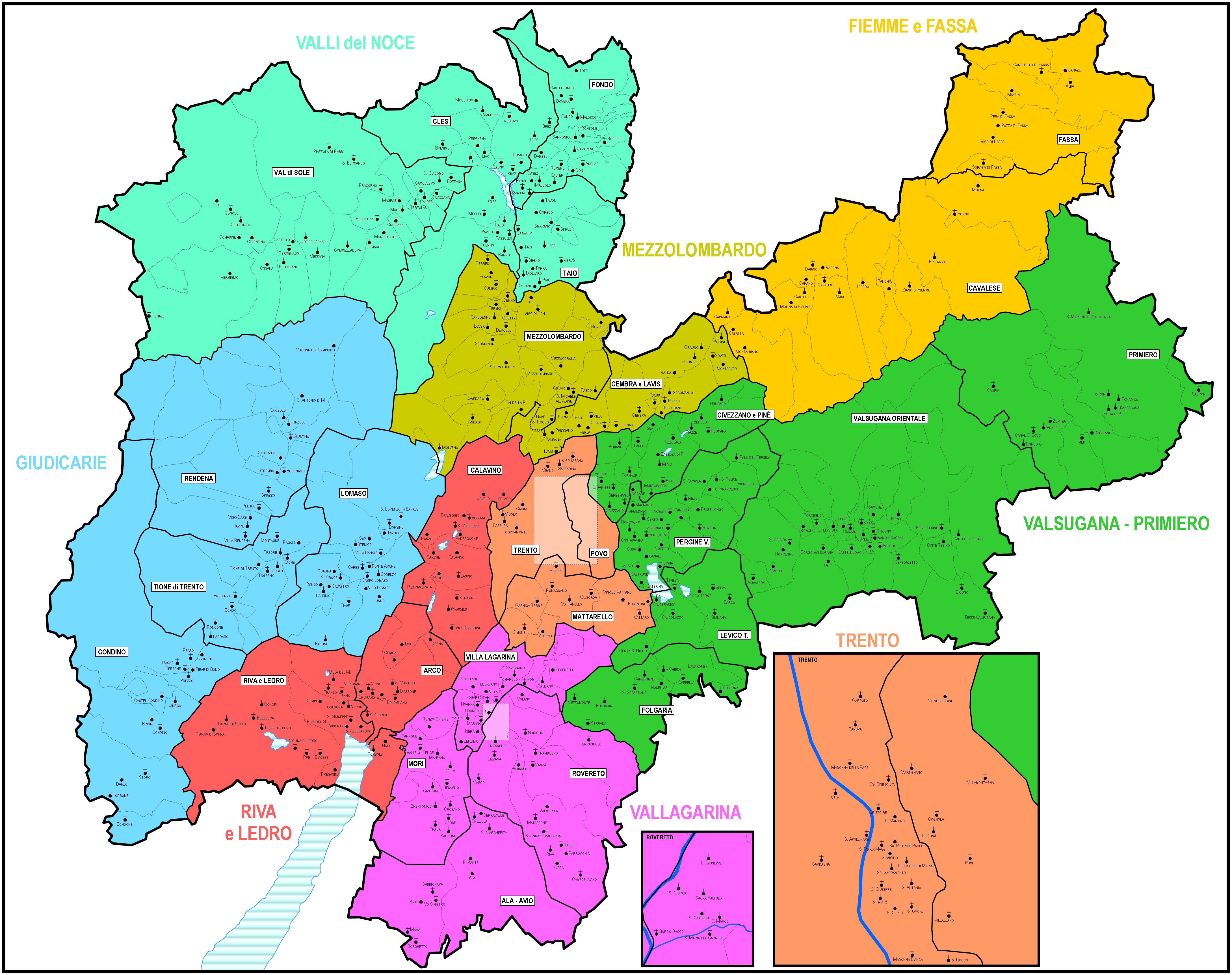 Territorio della Diocesi di Trento, suddiviso in parrocchie, decanati e zone pastorali